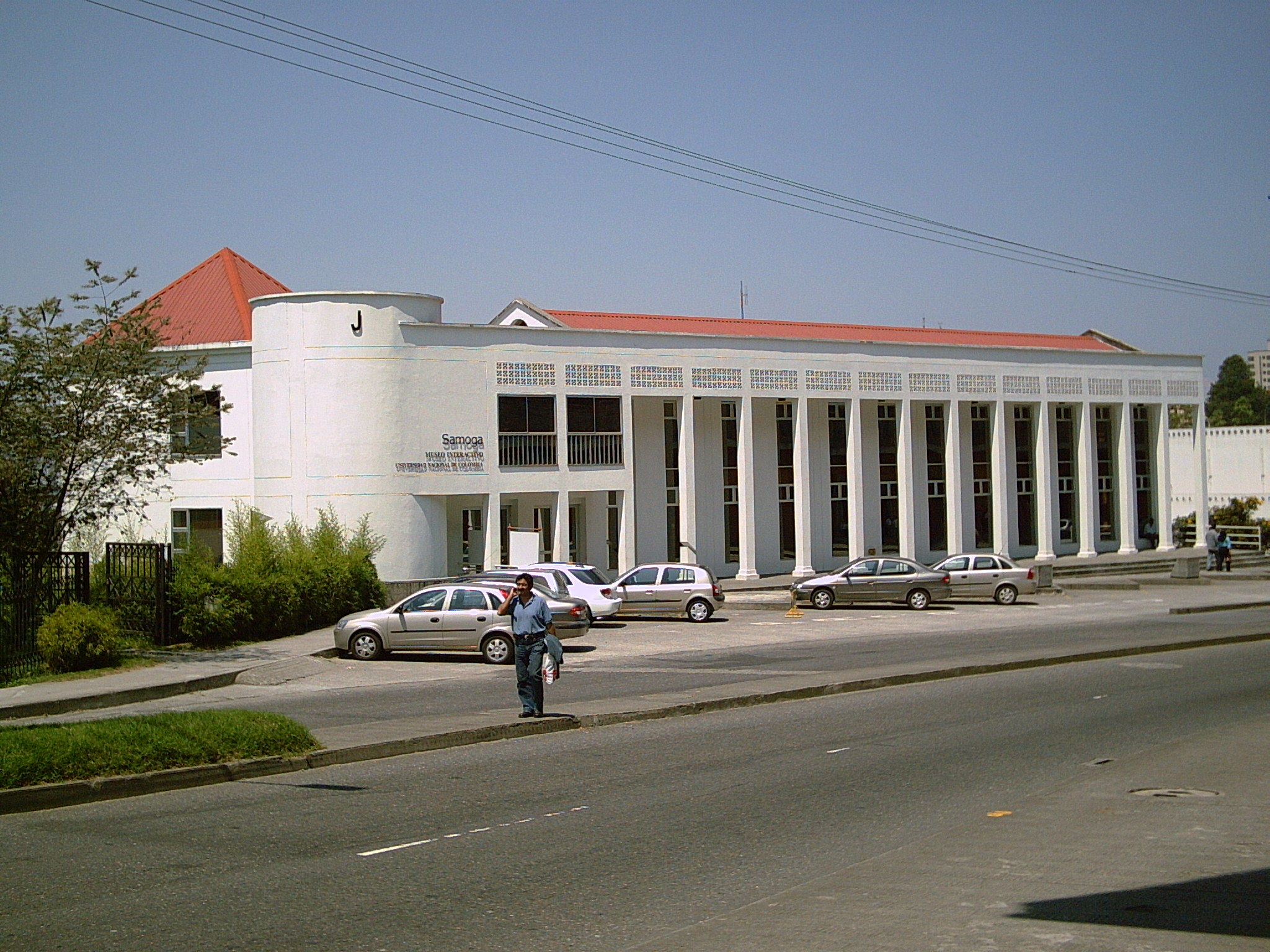 Museo Interactivo de la Ciencia y el Juego, Universidad Nacional de Colombia, Manizales.